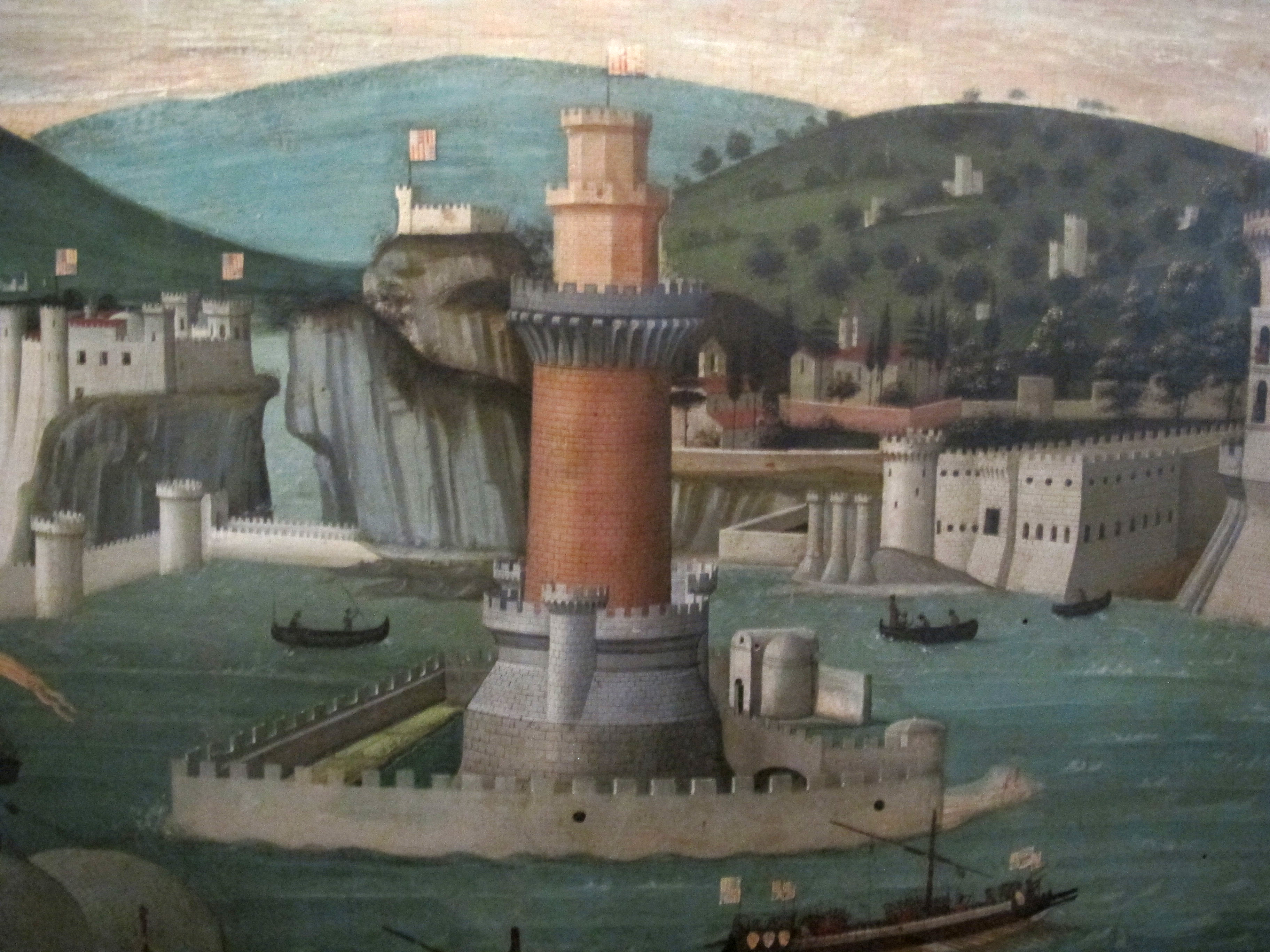 Museo di San Martino (Napoli)